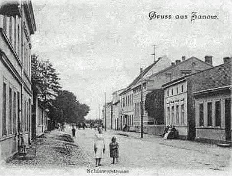 Sianów ok. 1900Zanow, Pommern, about 1900